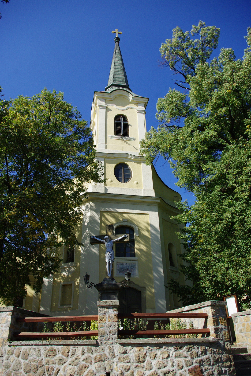 Római katolikus templom (Pomáz, Templom tér) This is a photo of a monument in Hungary, Identifier: 7249